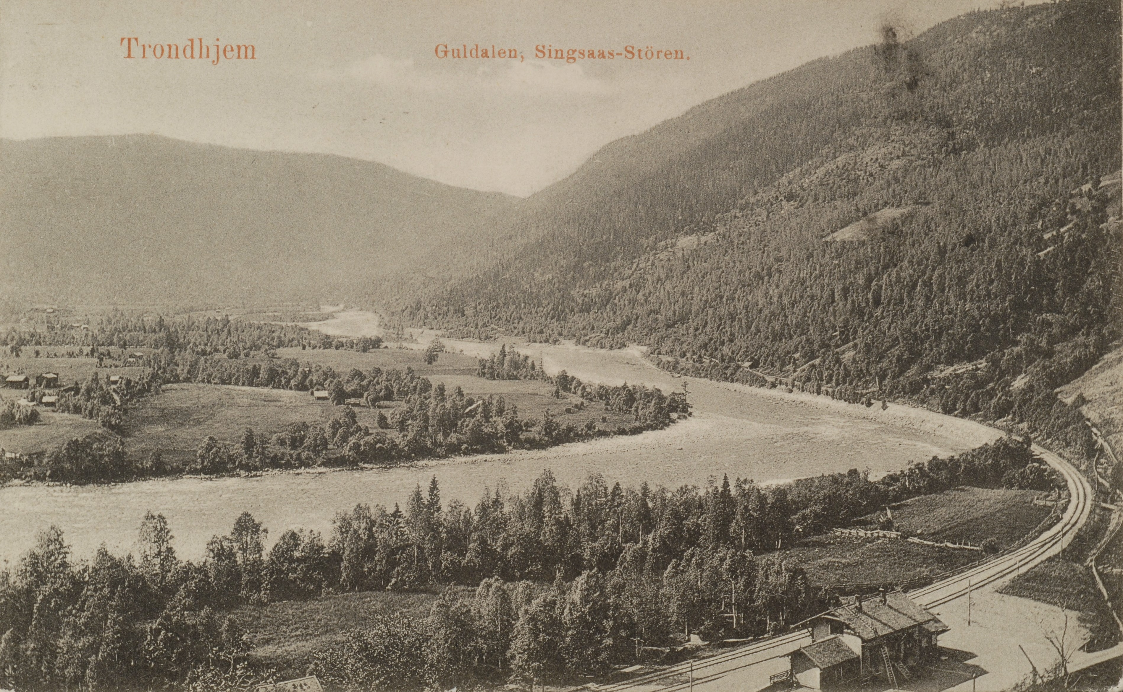 Bjørgen stasjon. Postkortmotiv av ukjent fotograf/NTNU.